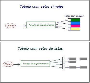 Primeiro exemplo de tabela hash